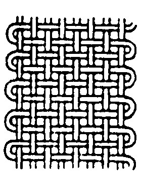 A legegyszerűbb szövetszerkezet (vászonkötés)